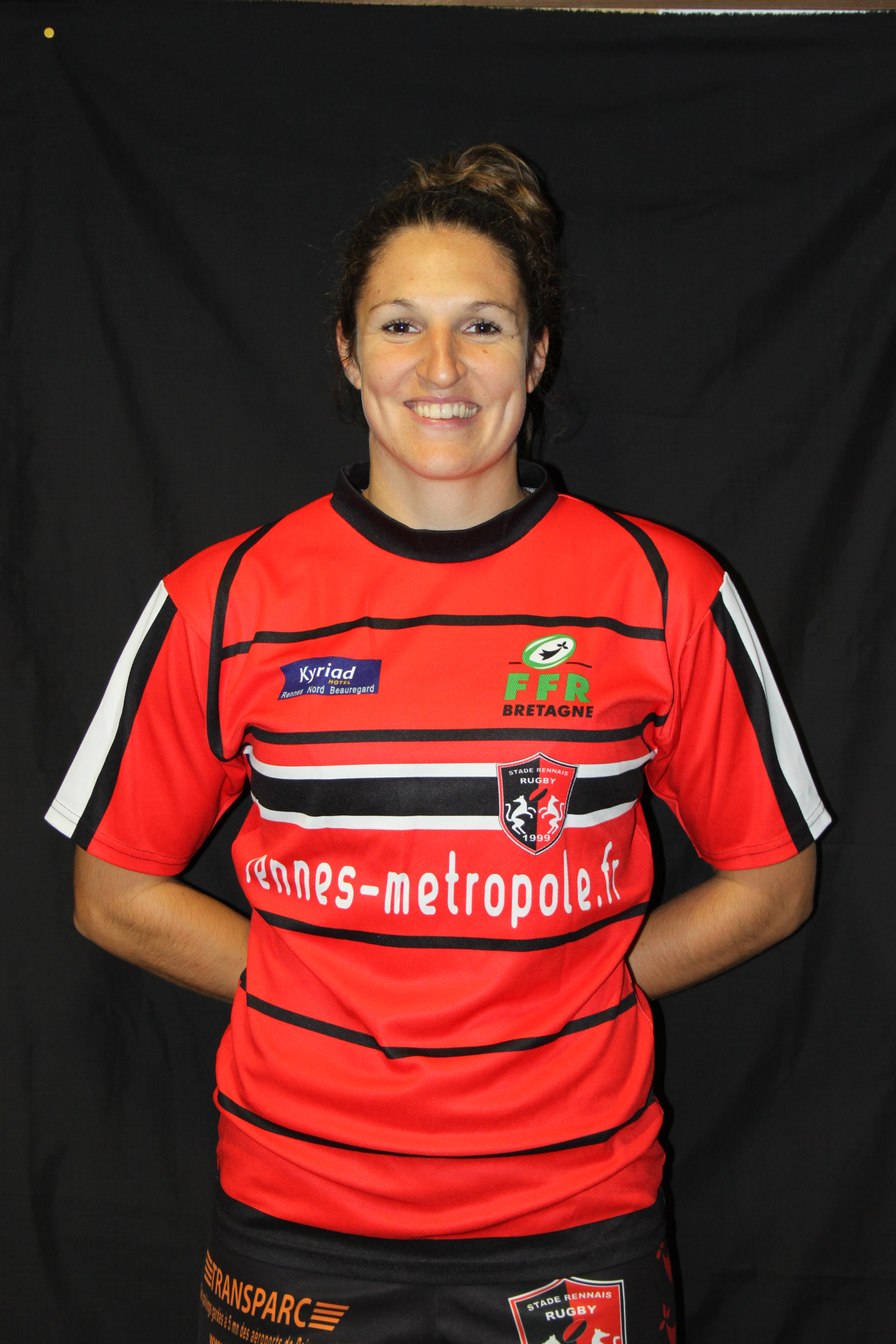 Photo de trombinoscope de Lenaïg Corson au Stade Rennais Rugby, saison 2015-2016.